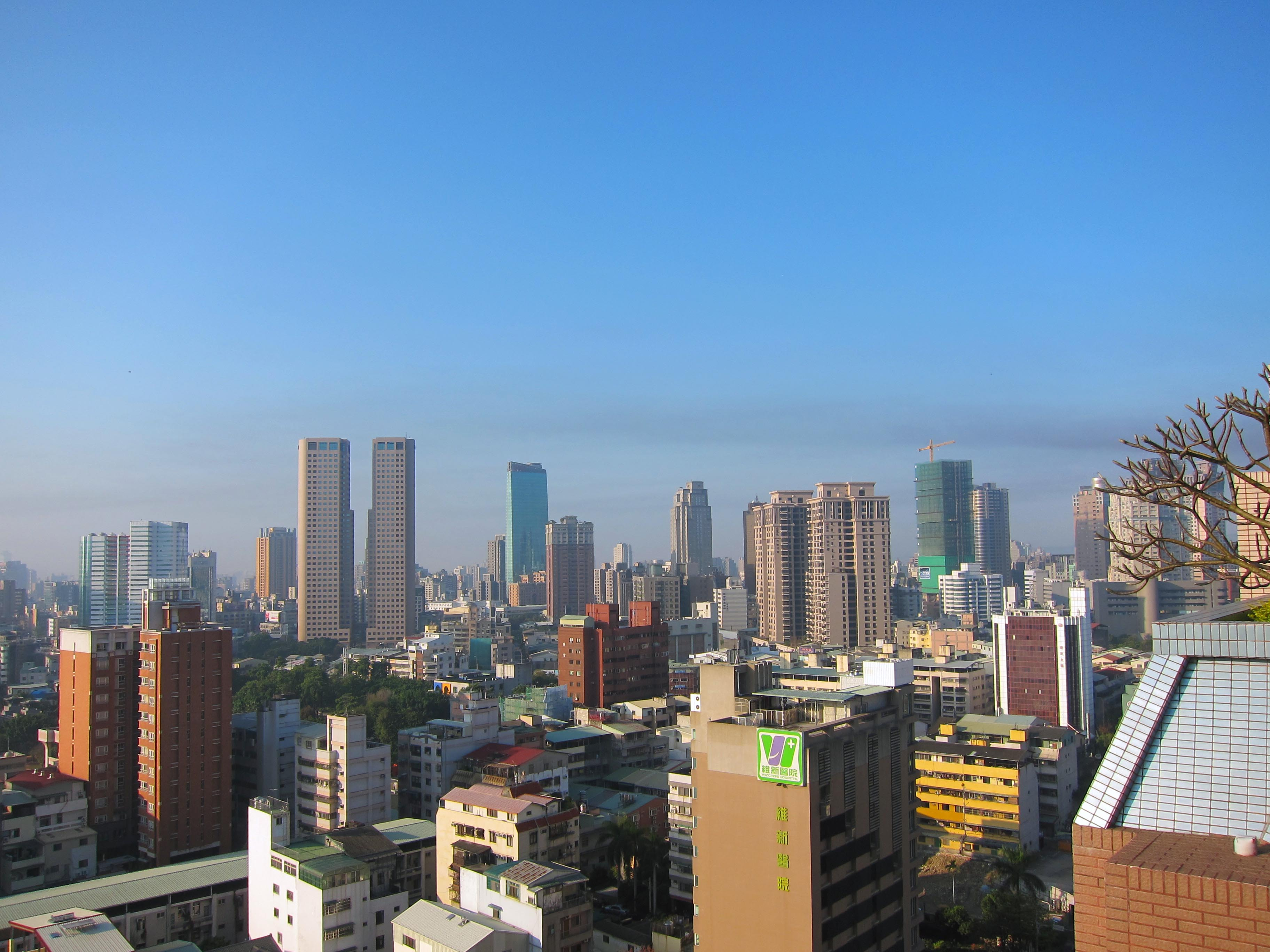 台中市晴空的天際線